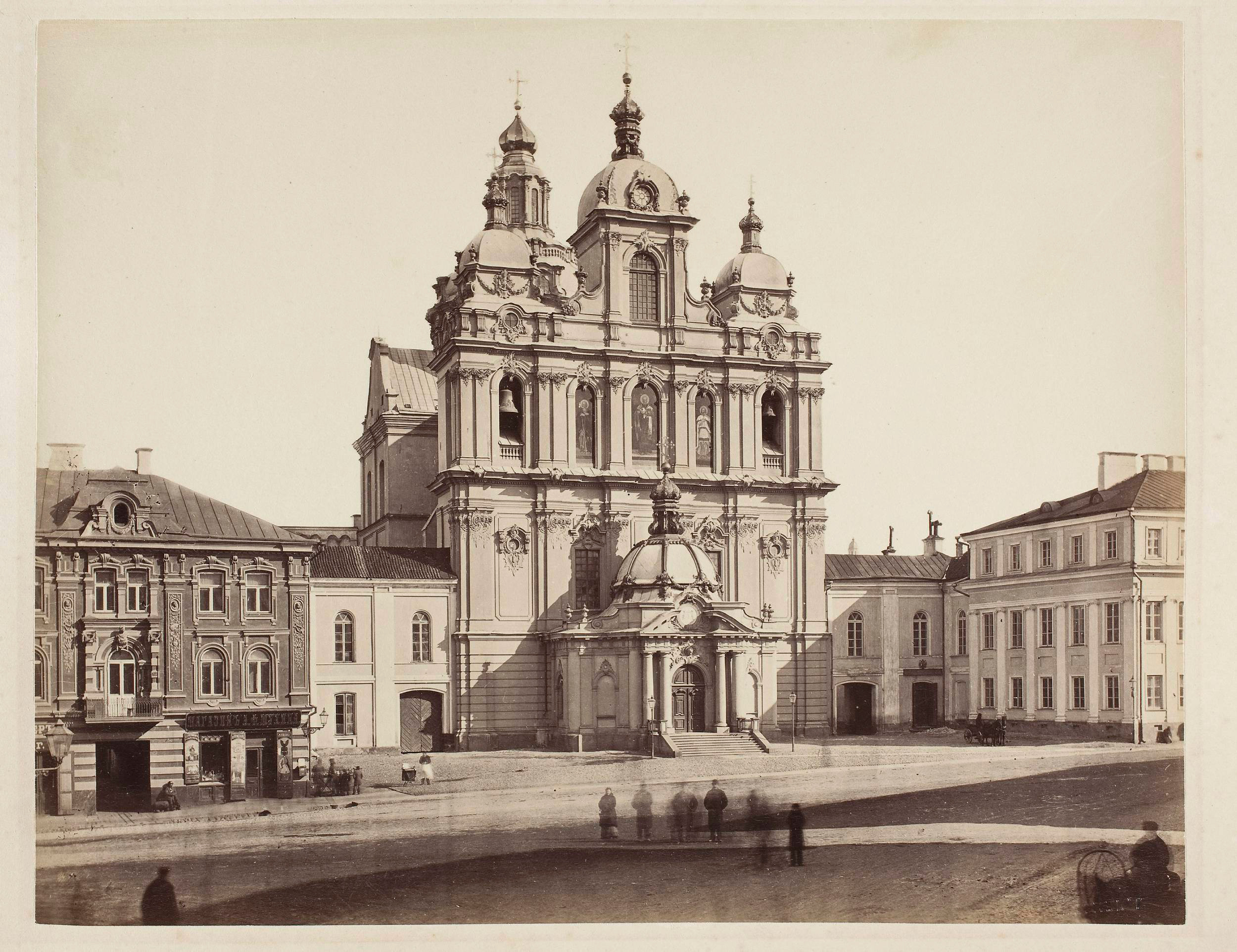 Беларуская (тарашкевіца): Вільня (Vilnia), вуліца Вялікая (vulica Vialikaja). Касьцёл Сьвятога Казімера па маскоўскай перабудове